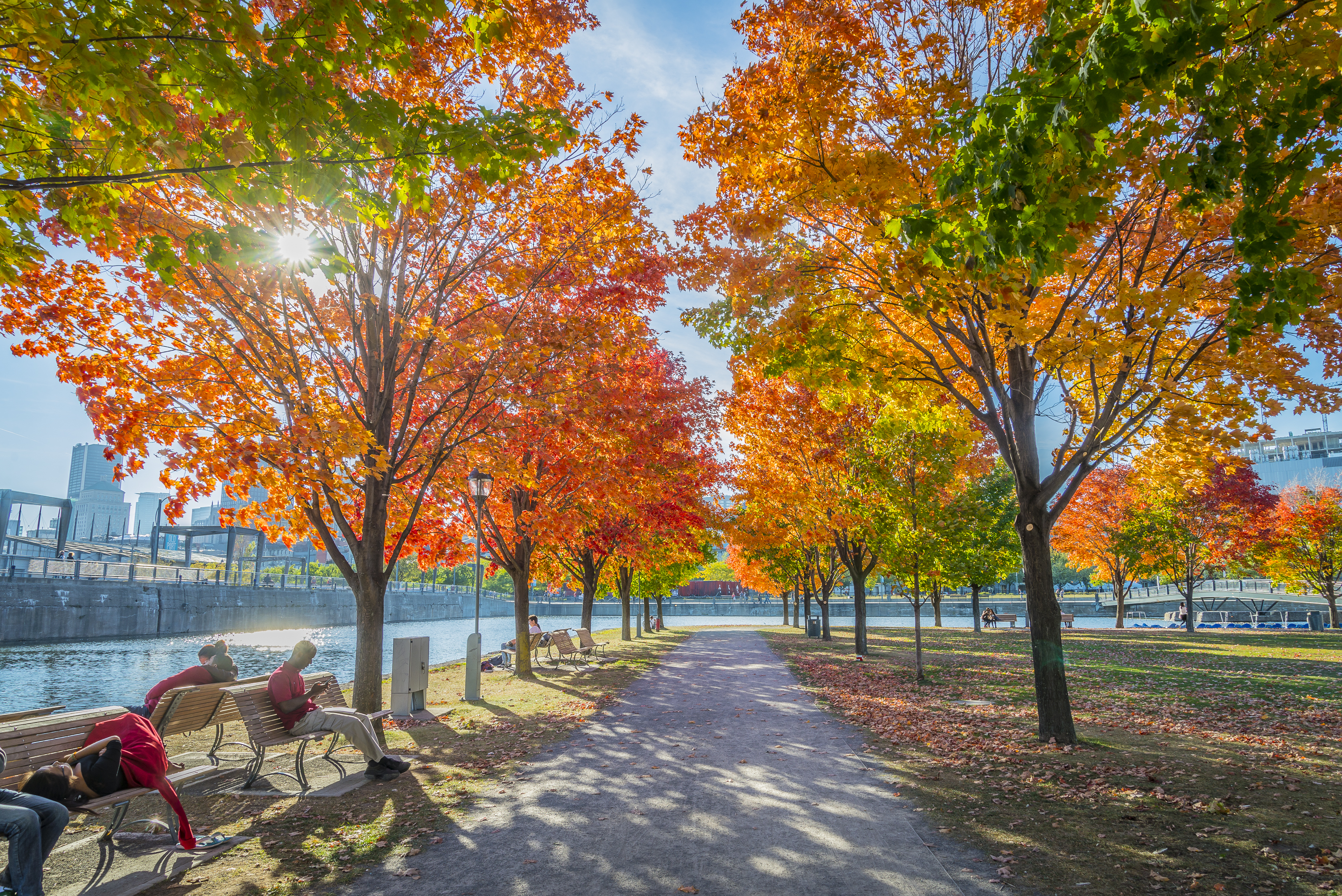 Le Vieux-Port de Montréal est situé sur la berge gauche du fleuve Saint-Laurent, il s'étend sur plus de deux kilomètres au sud du Vieux-Montréal, depuis la rue McGill jusqu'à l'axe de la rue Amherst qui ne s'y rend pas mais d'où l'on aperçoit la tour de l'horloge. À l'ouest, on trouve sur le quai Alexandra, la gare maritime Iberville qui accueille des bateaux de grande taille. Enfin, le quai de l'horloge, en forme de L, mène à la Tour de l'Horloge.